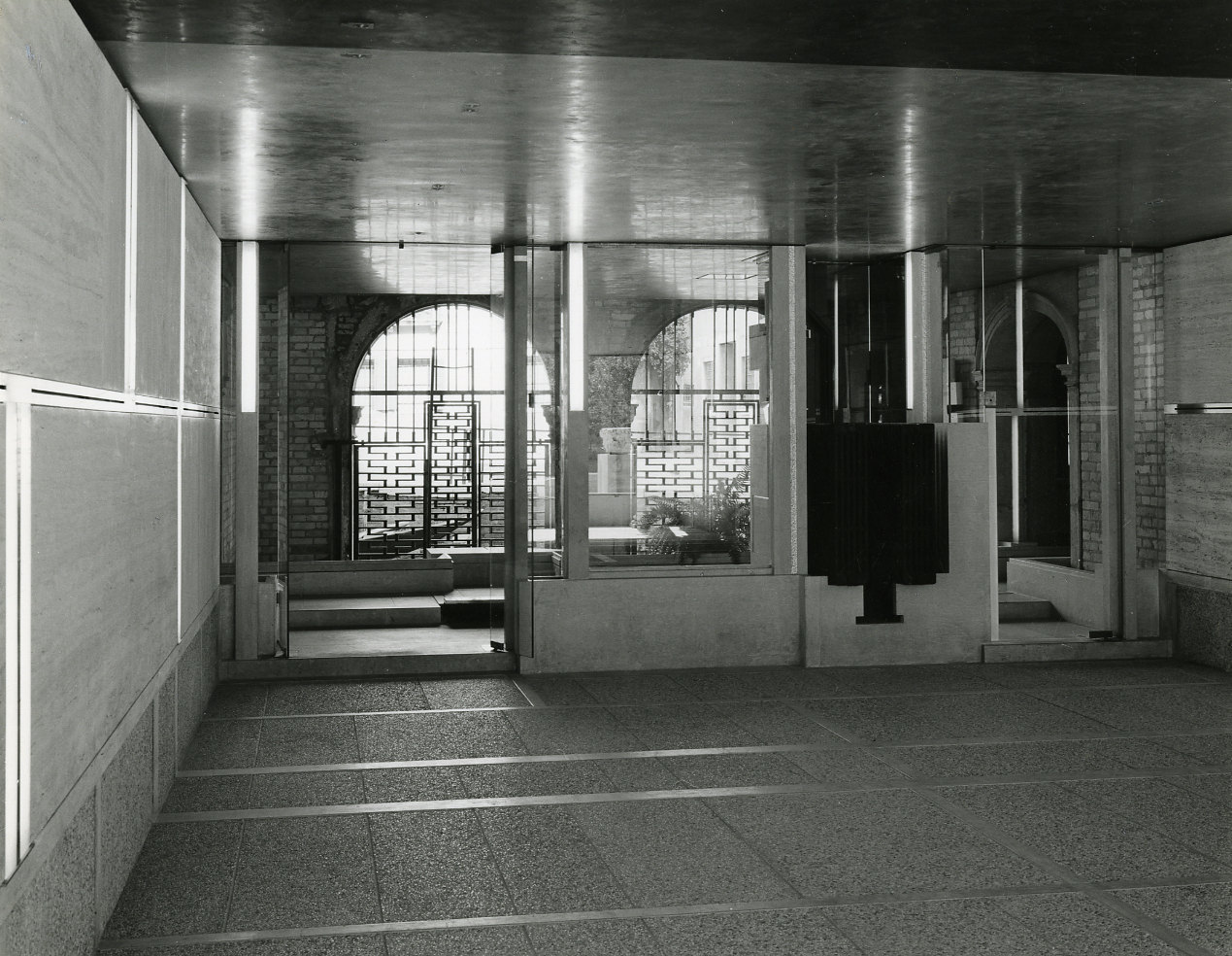 Venezia. Palazzo Querini Stampalia dopo l'intervento di Carlo Scarpa. Particolari architettonici interni. Servizio fotografico : Venezia, 1963 / Paolo Monti. - Stampe: 15 : Positivo b/n, gelatina bromuro d'argento/ carta, 24x30. - ((Al verso delle stampe manoscritto numero di negativo corrispondente: 7204, 7206, 7209, 7210, 7211, 7213, 7214, 7223, 7226, 7235, 7238, 7239, 7242, 7243. - Sul coperchio della scatola, manoscritto a pennarello: "Archit. Moderna". - Occasione: Documentazione del restauro dell'architetto Carlo Scarpa realizzato sul pianterreno e il giardino della Fondazione Querini Stampalia di Venezia. - Fonte: Rubrica di Paolo Monti: Archivio 10x12 (ultimi numerati) - dal G1 al (s.d.), presso Archivio Paolo Monti